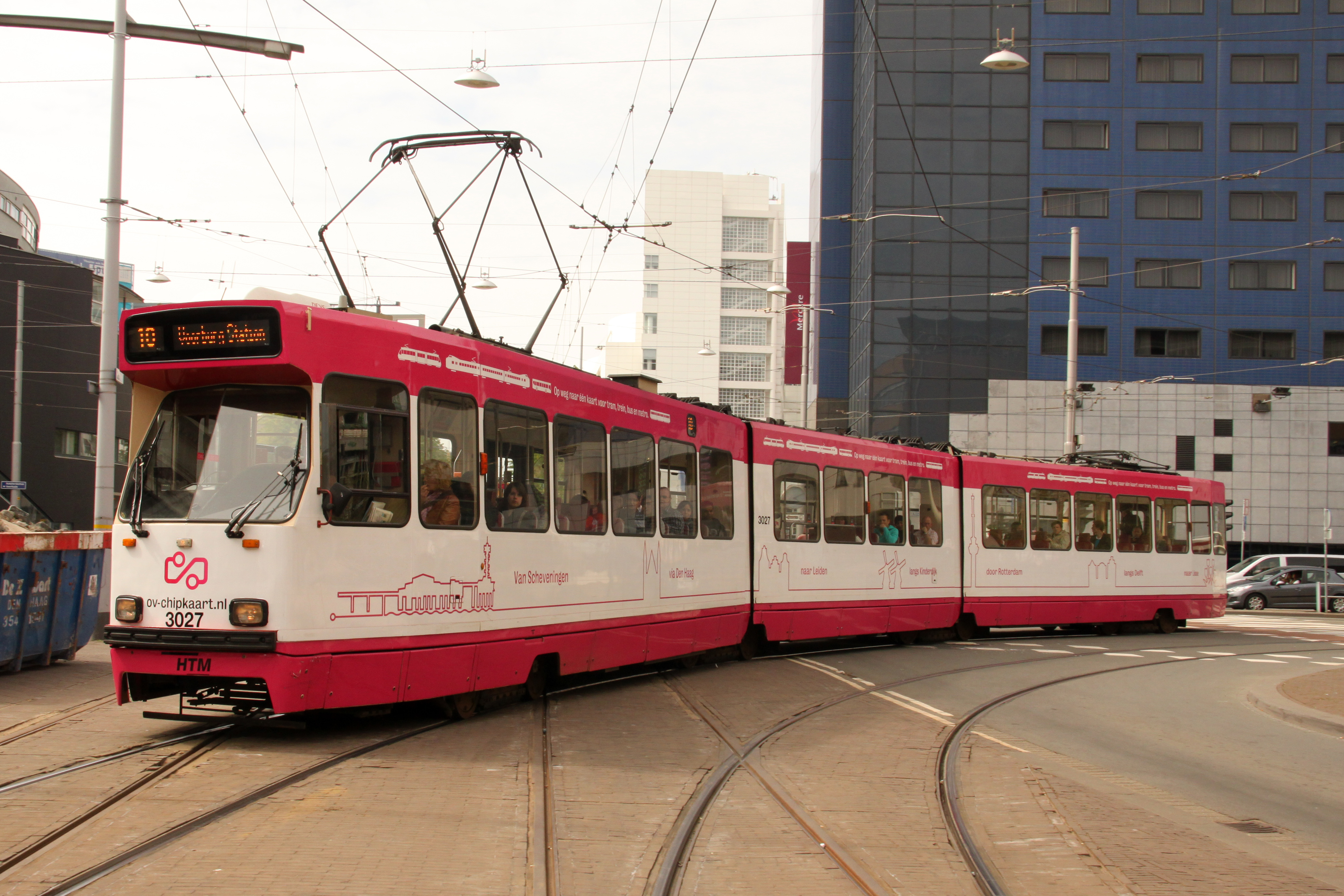 Een Haagse tram met reclame voor de OV-chipkaart in het centrum van Den Haag.